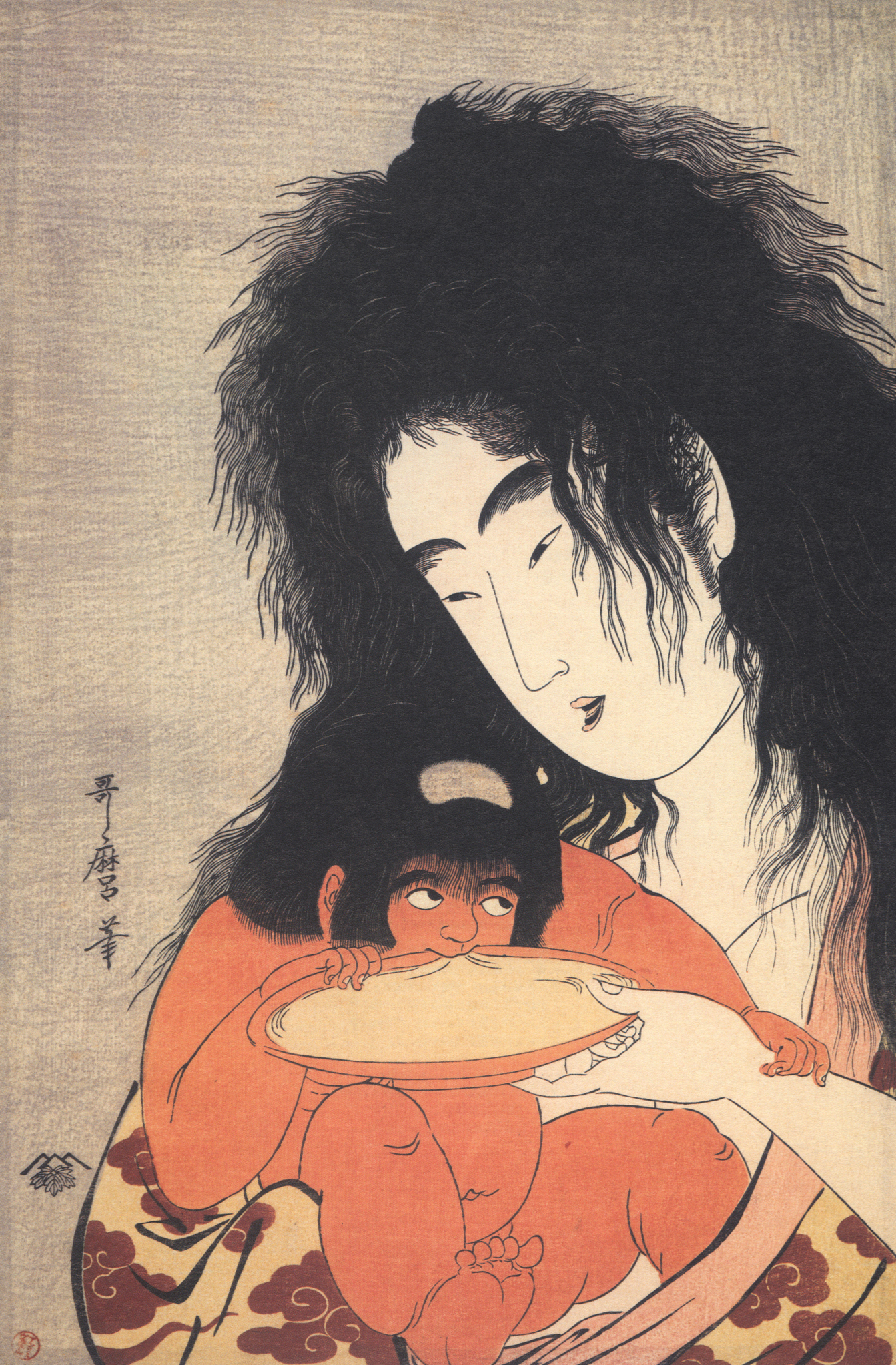 浮世絵(Ukiyoe) “山姥と金太郎 盃” 重要美術品